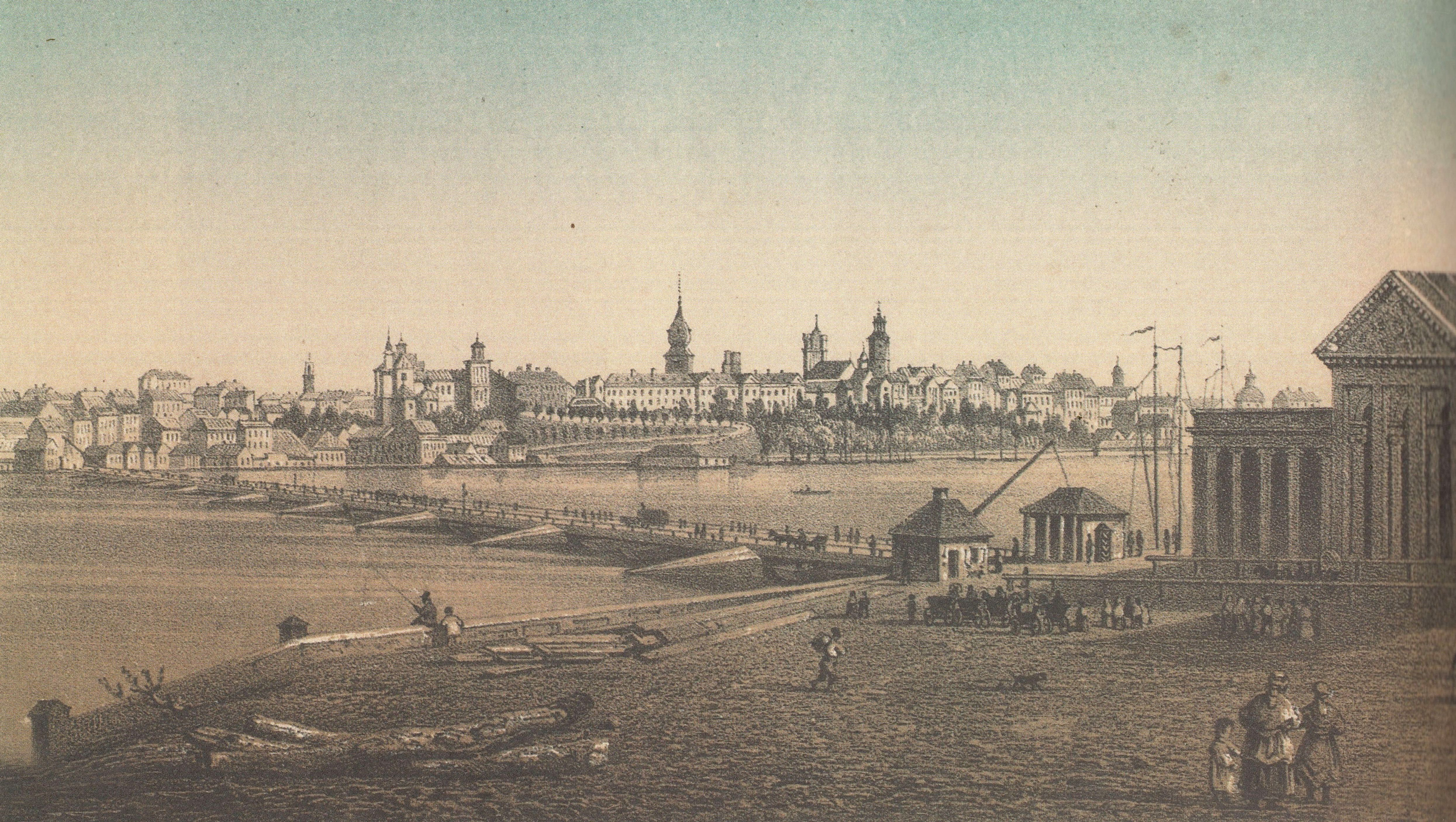 Warszawa od strony Pragi. Chromolitografia Juliana Ceglińskiego